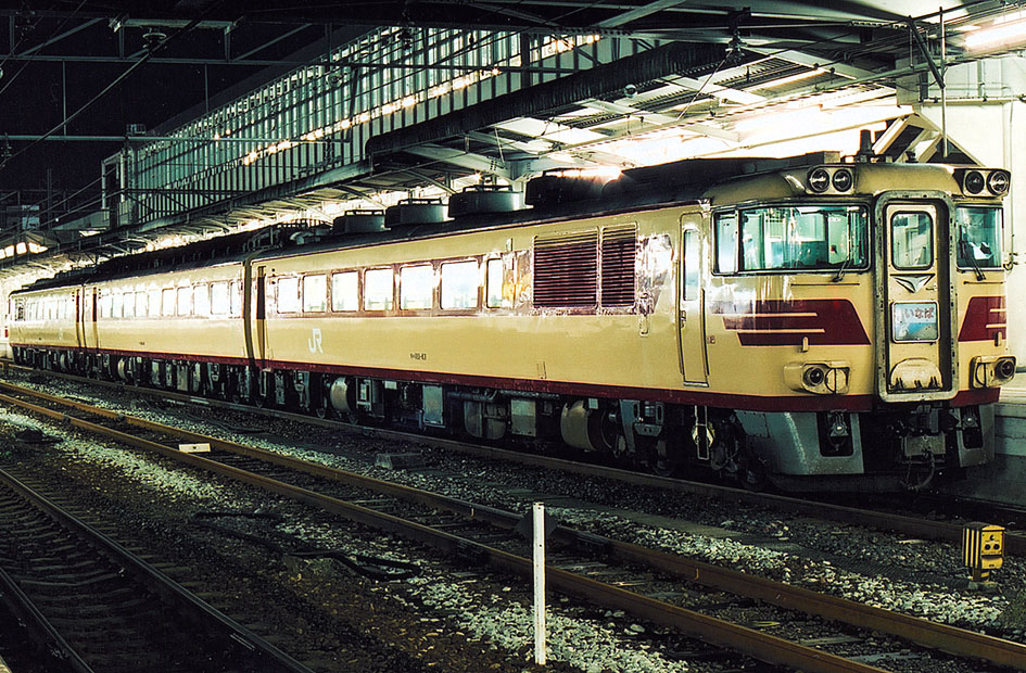 国鉄キハ181系特急「いなば」